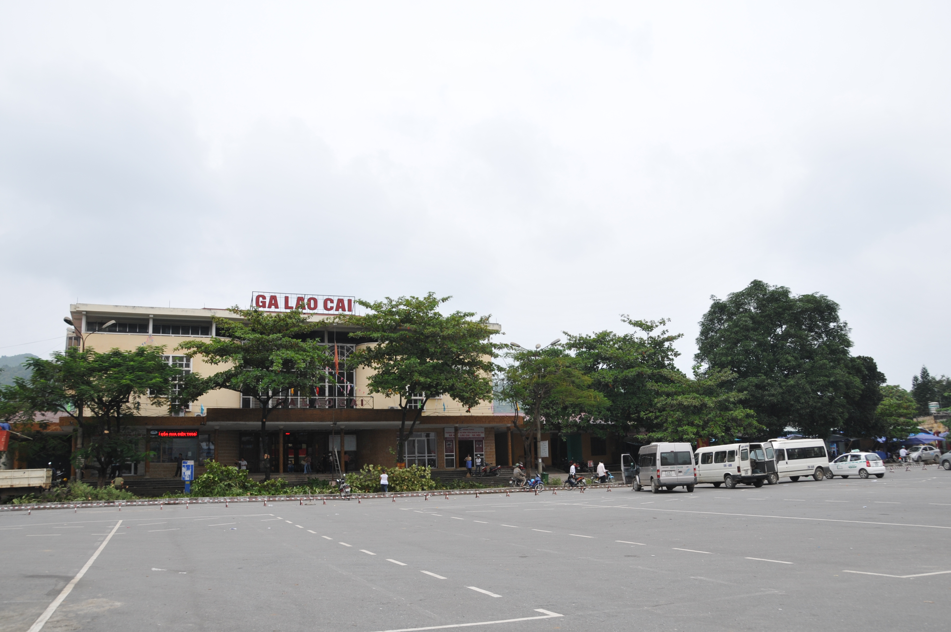 Ga tàu Lào Cai